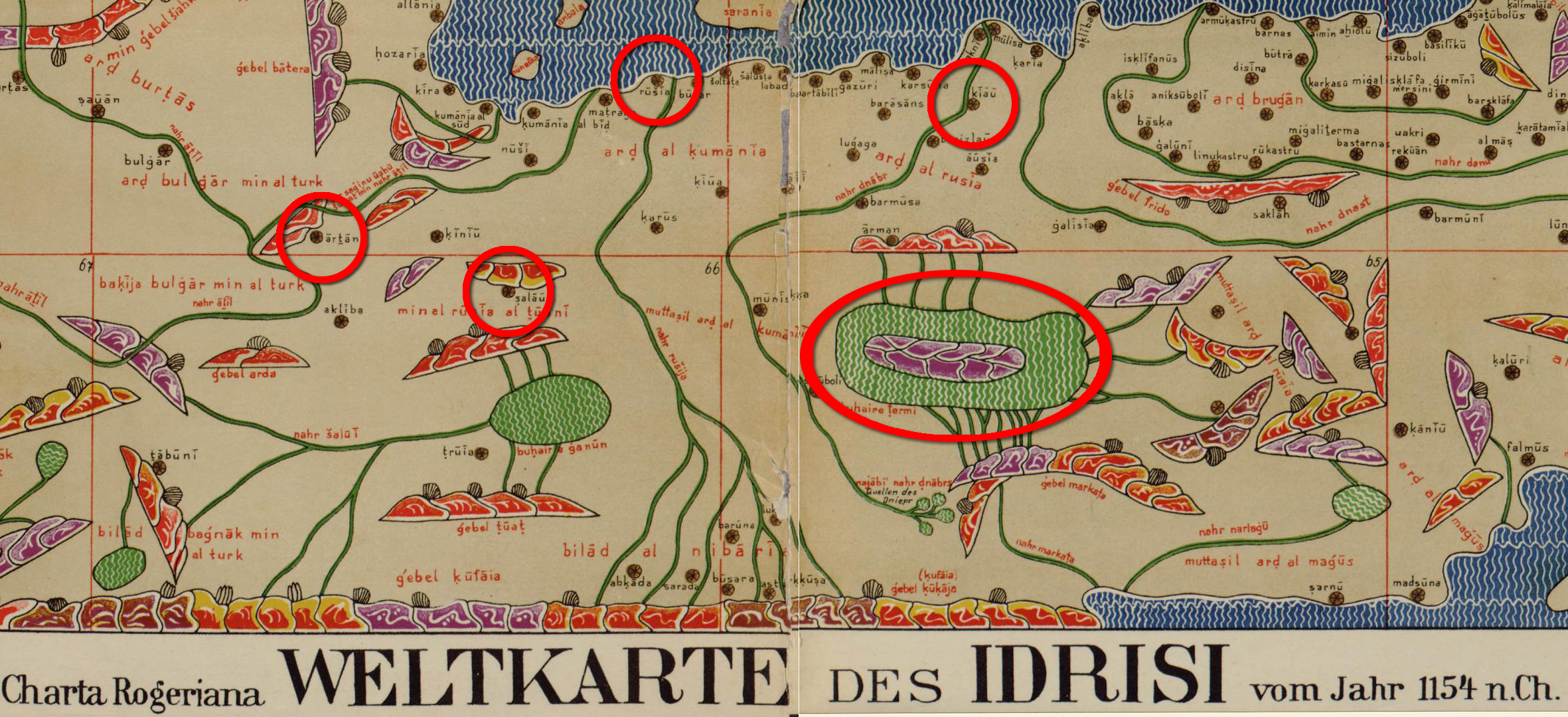 Центры Руси по Идриси